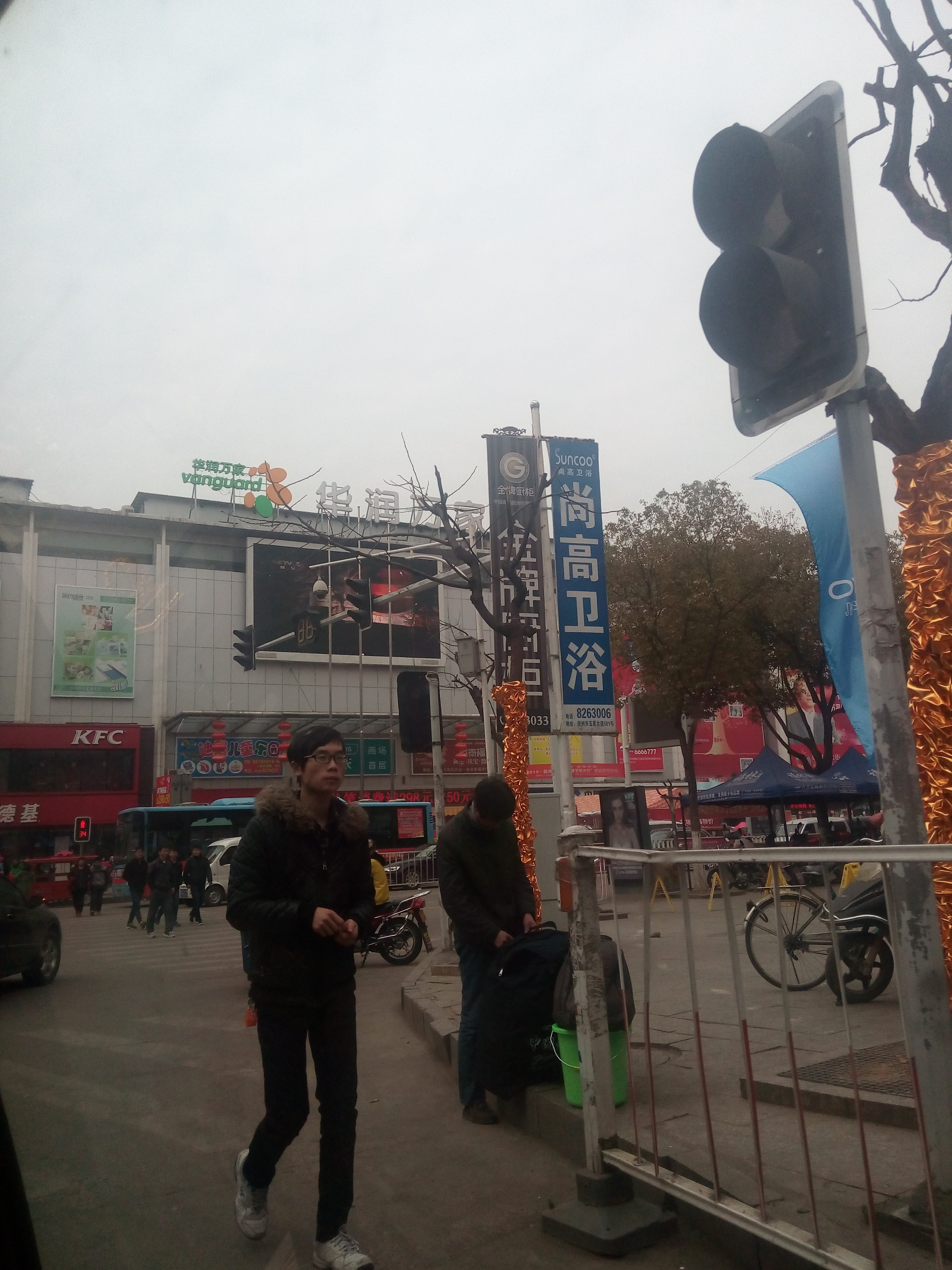 收购后洪客隆抚州店改名为华润万家